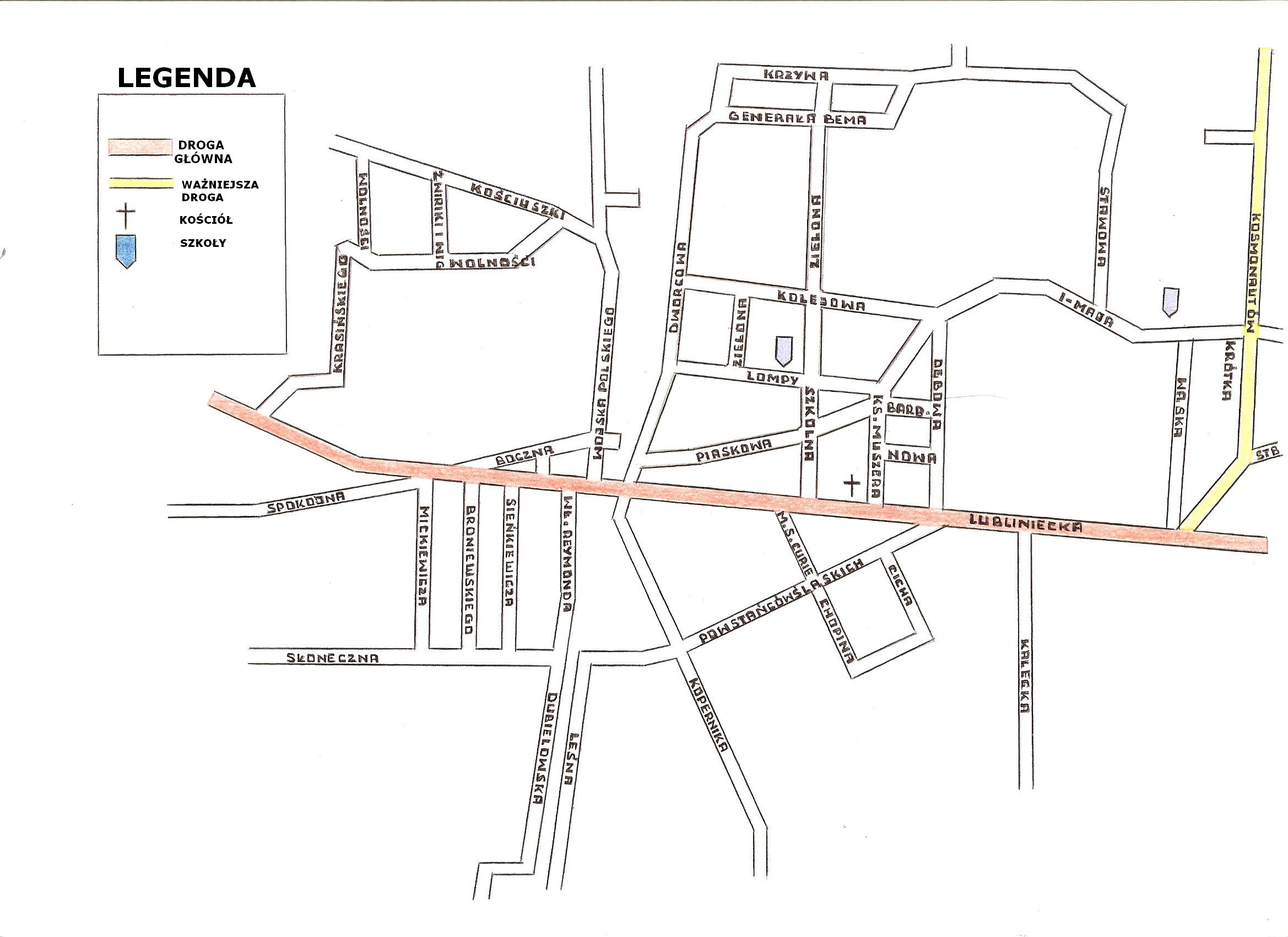 Ulice Strzebinia